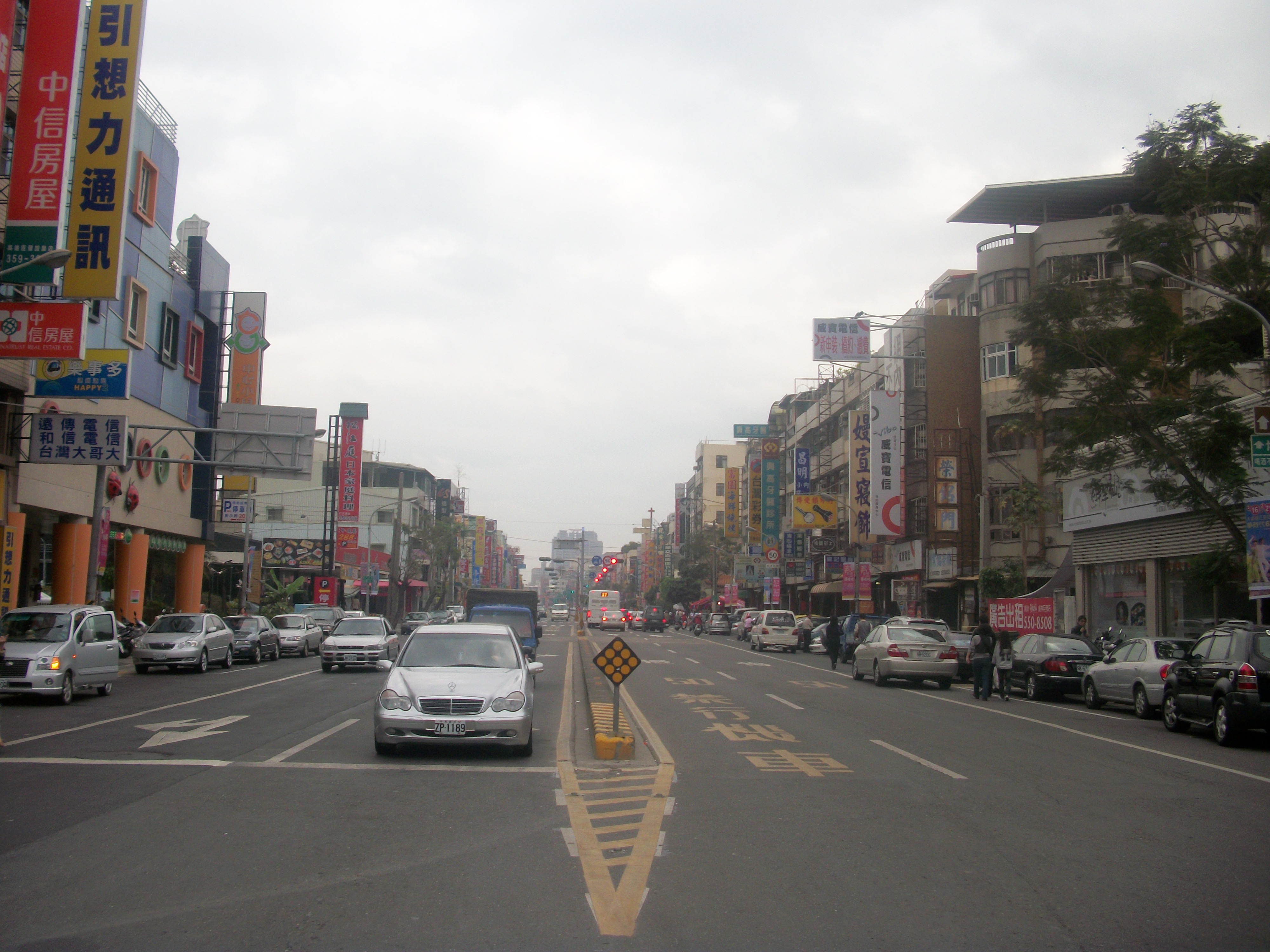 高雄市新庄仔路